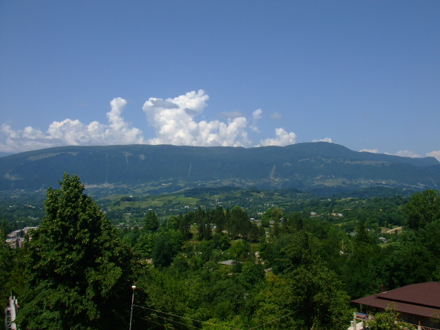 Martvili monastery